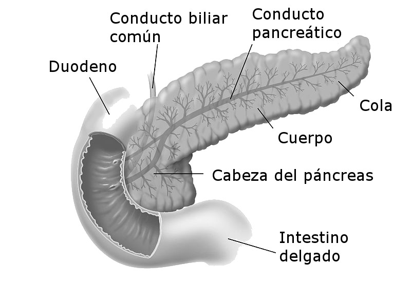 Anatomía del páncreas con su distribución en cabeza, cuerpo y cola.